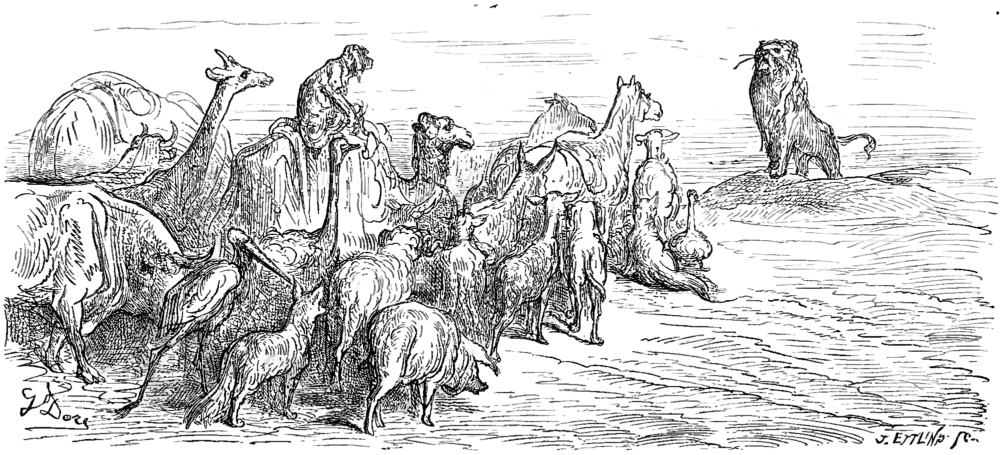 grafika z książki PL Bajki, Jean de La Fontaine, nakładem i drukiem Jana Noskowskiego, Warszawa 1876